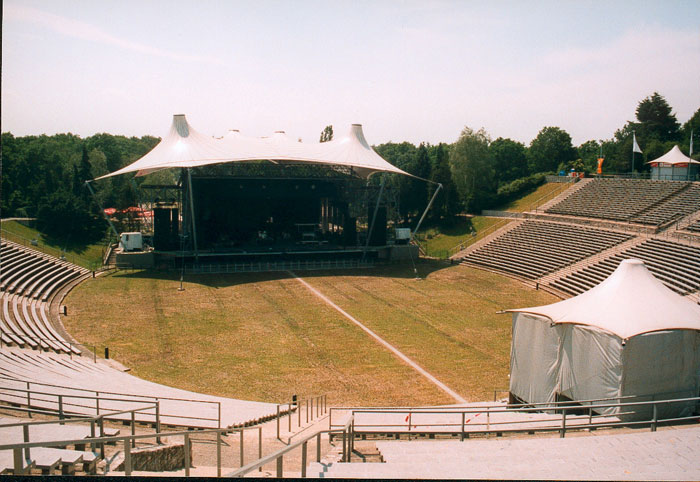 Wuhlheide_heute (2000)